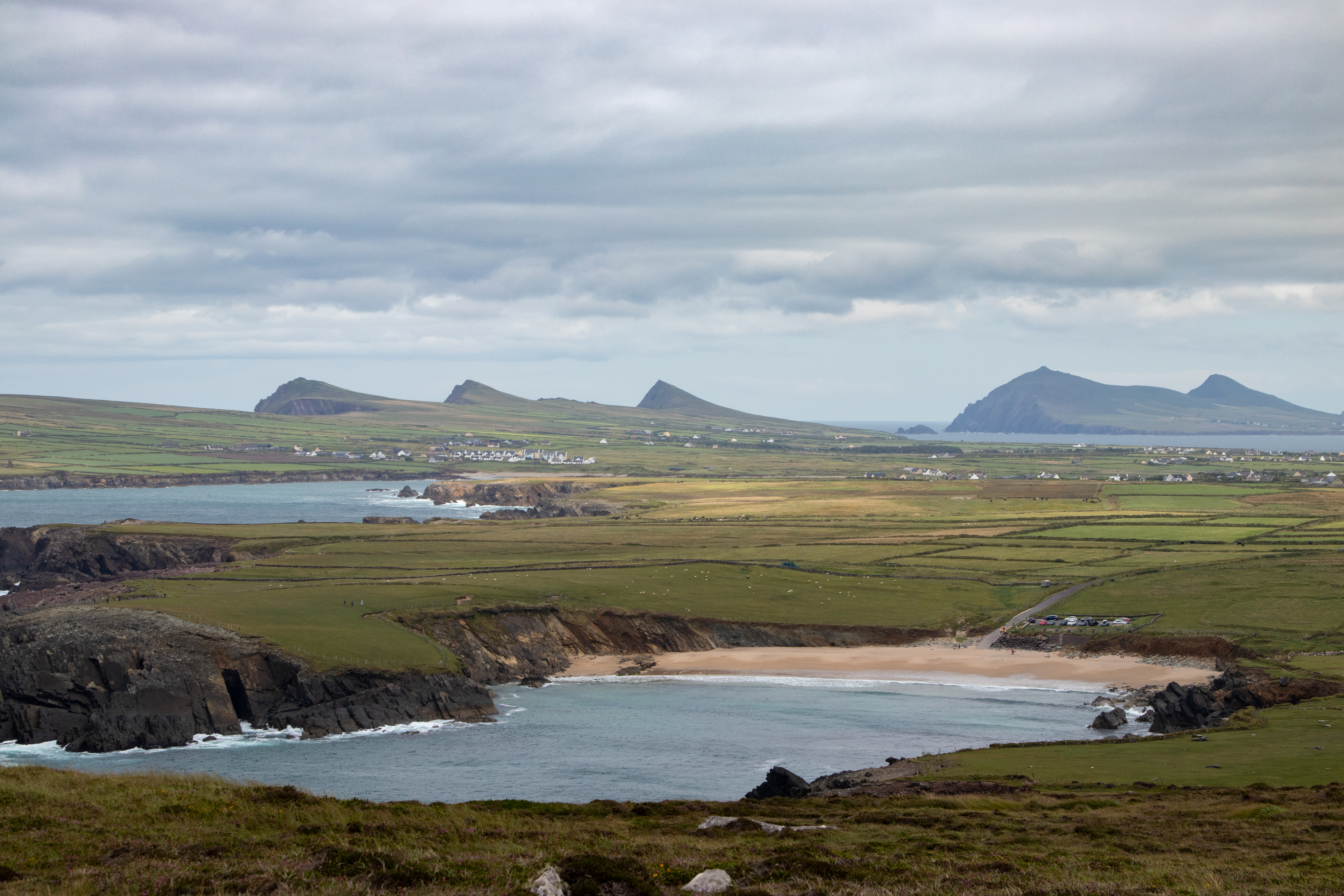 "Three Sisters" an der Smerwick-Bucht auf der Nordseite der Dingle-Halbinsel, Irland. Davor die Dún An Óir Cottages und die Siedlungen Lisnaponra North, Newton und Derrysillagh. Rechts hinten Dunacapple Island und Ballydavid Head. Im Vordergrund der Clogher Strand